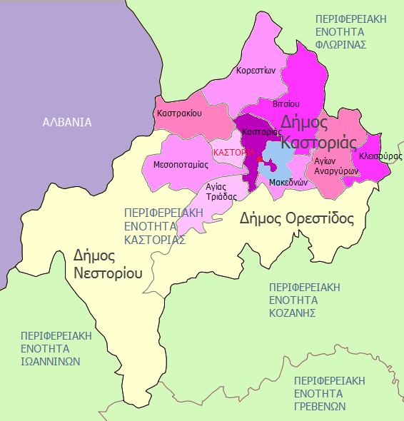 Δήμος Καστοριάς - Δημοτικές Ενότητες